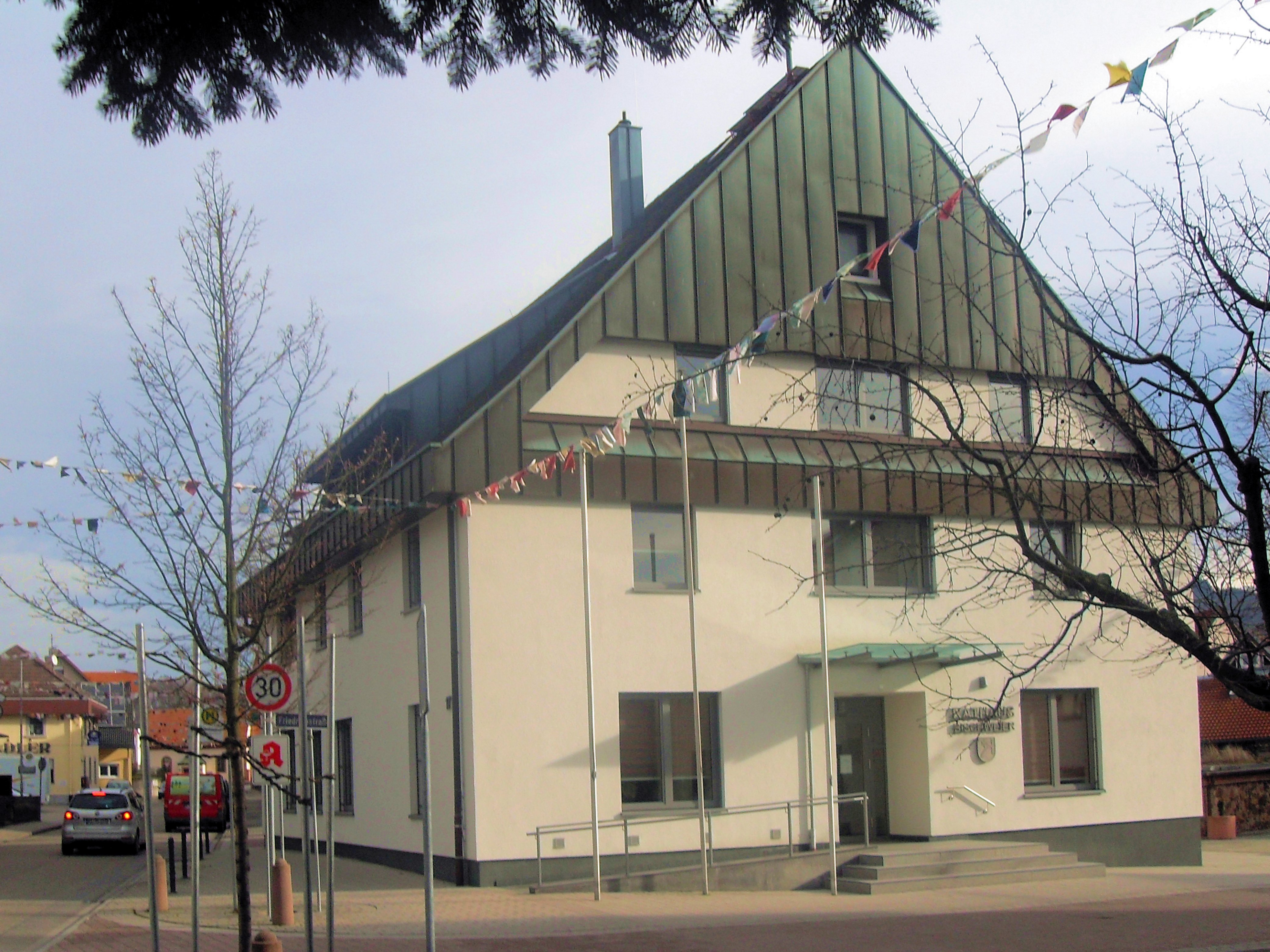 Rathaus der Gemeinde Bischweier, Landkreis Rastatt